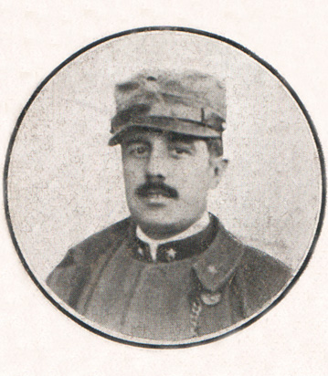 Teodoro Mariani, sportivo e militare italiano.